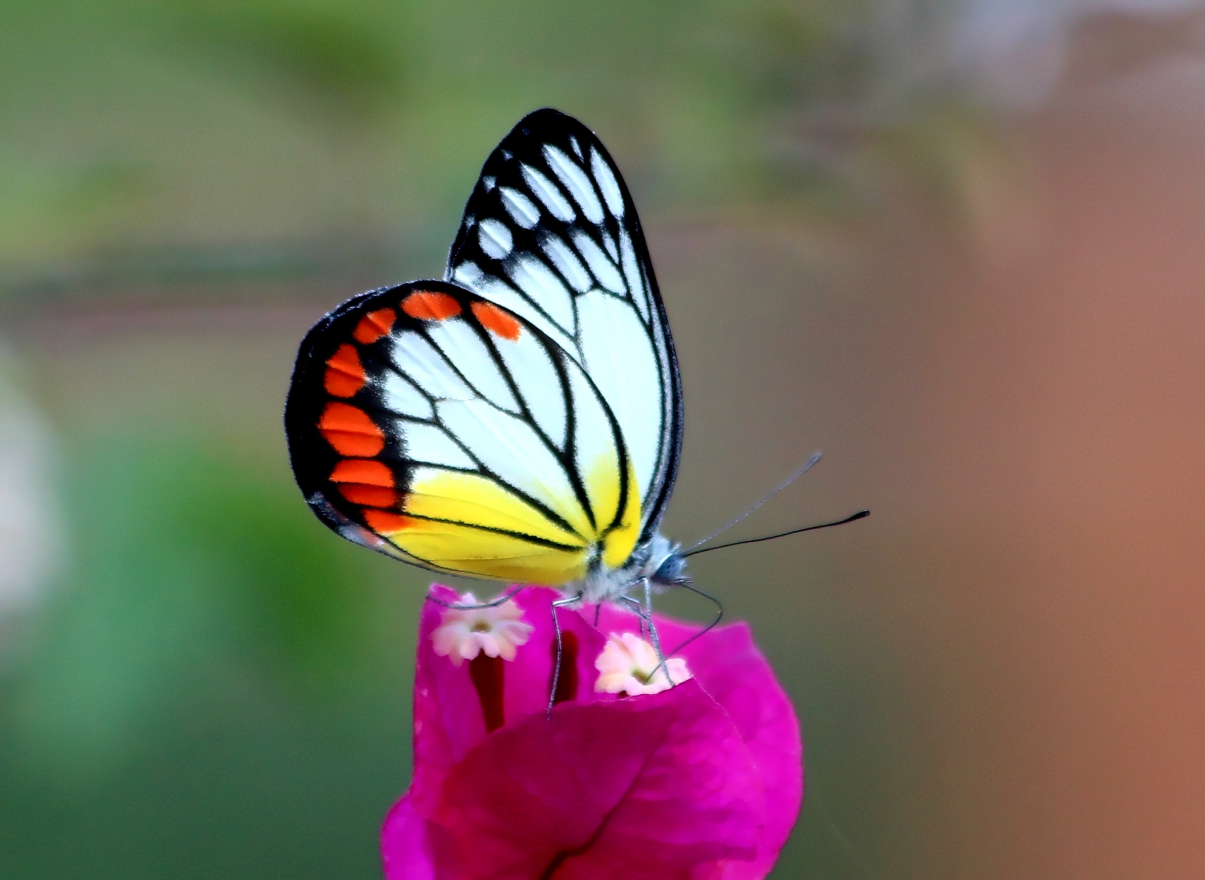 IMG_0807/Bali Island/Kalibukbuk Area/Delias Hyparète Hyparète/male form/